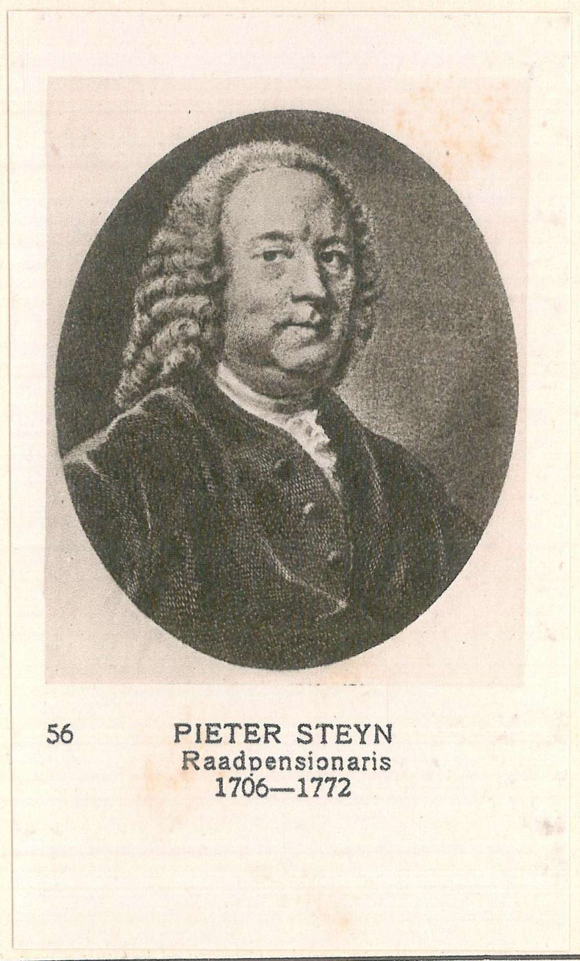 56 Pieter Steyn, Raadpensionaris, 1706-1772. Vaderlandse Historie 2 (1926)